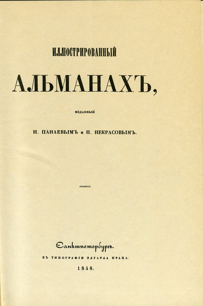 "Иллюстрированный альманах" Н. А. Некрасоова